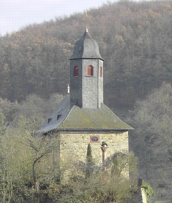 Blick von Westen auf die Reichenberger Kirche